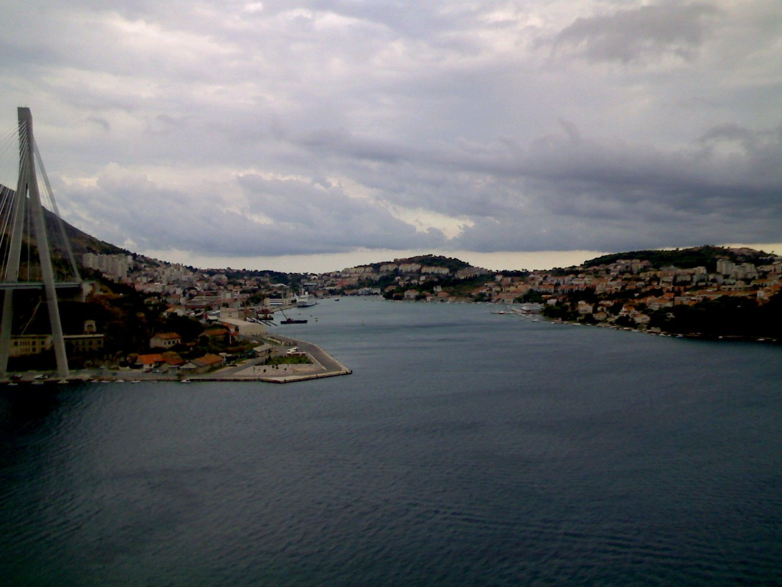 Dubrovnik